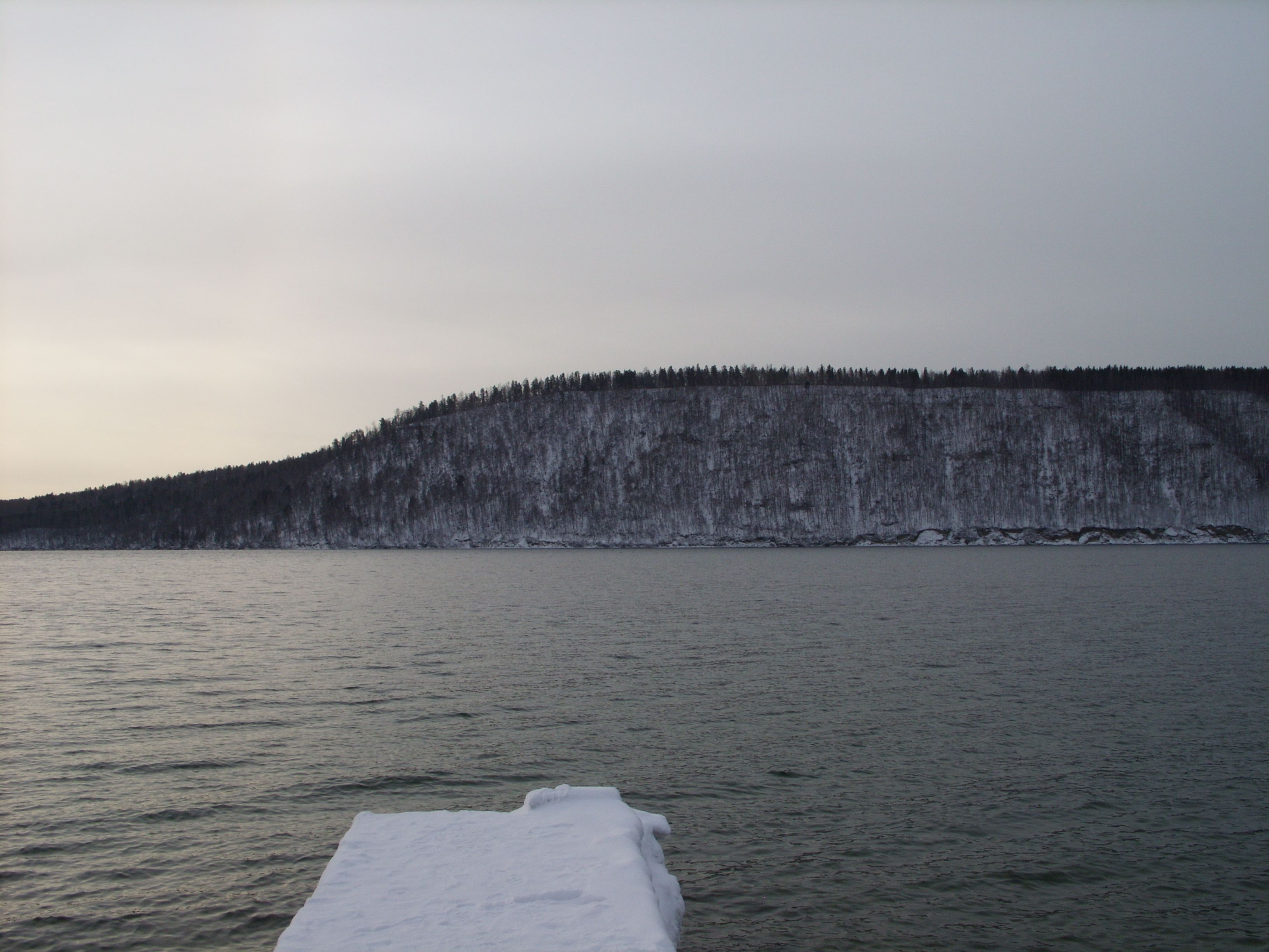 Иркутская область, Россия